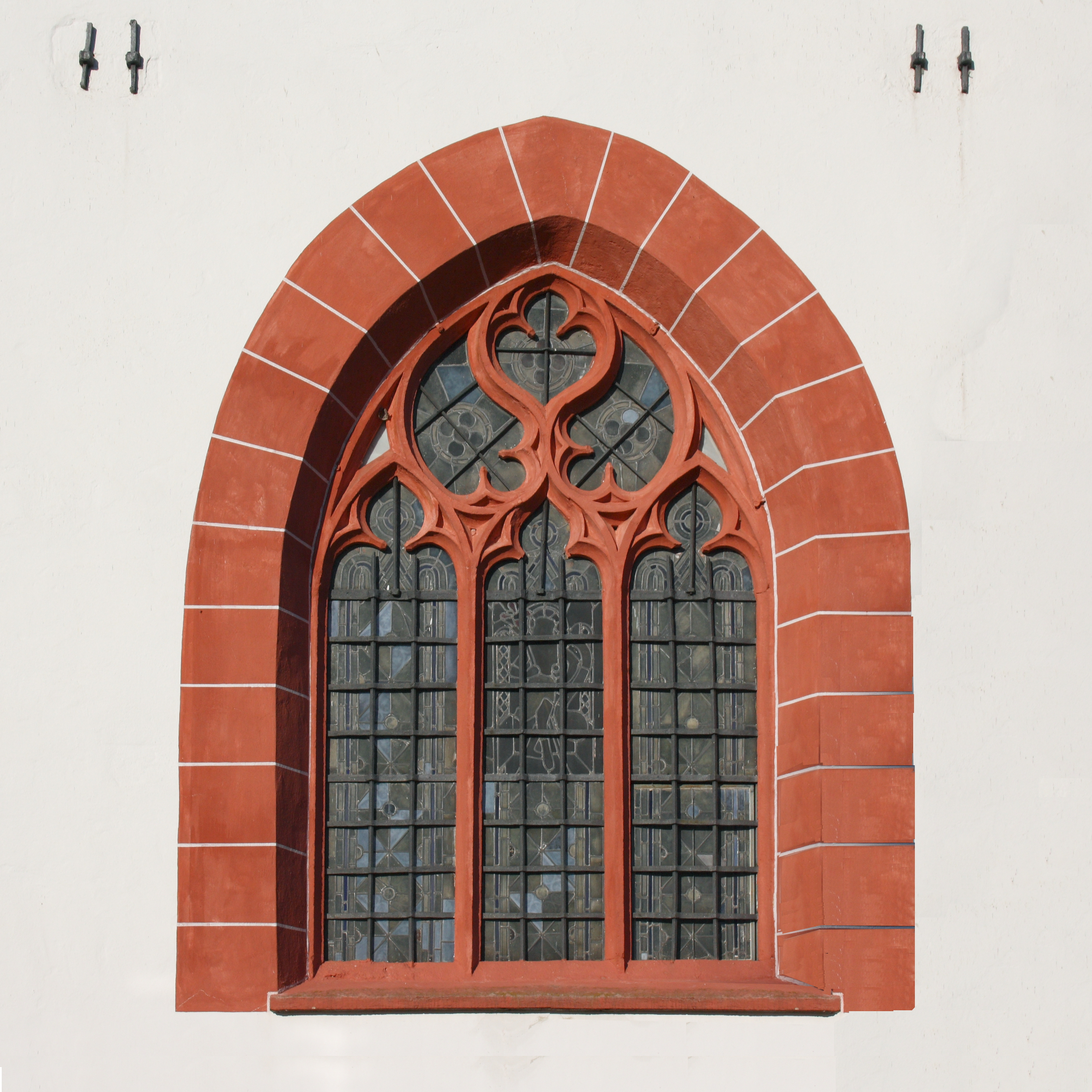 Katholische Filialkirche, ehemalige Klosterkirche St. Georg in Niederwerth im Landkreis Mayen-Koblenz (Rheinland-Pfalz), Maßwerkfenster